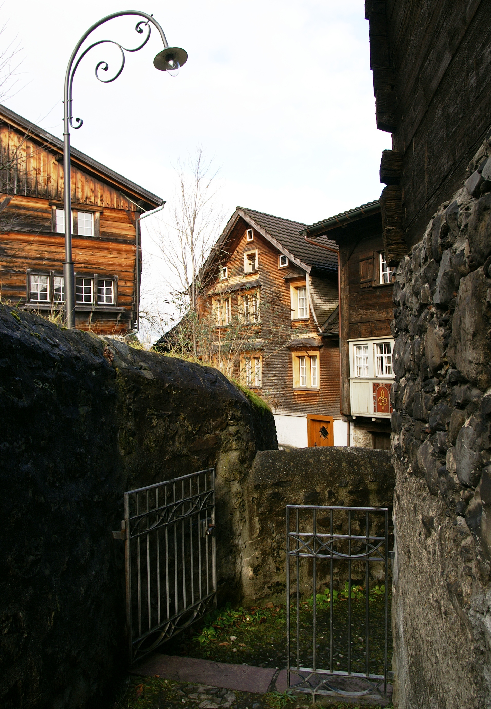 Schloss und Burgstädtchen Werdenberg im Schweizer Rheintal in Grabs.